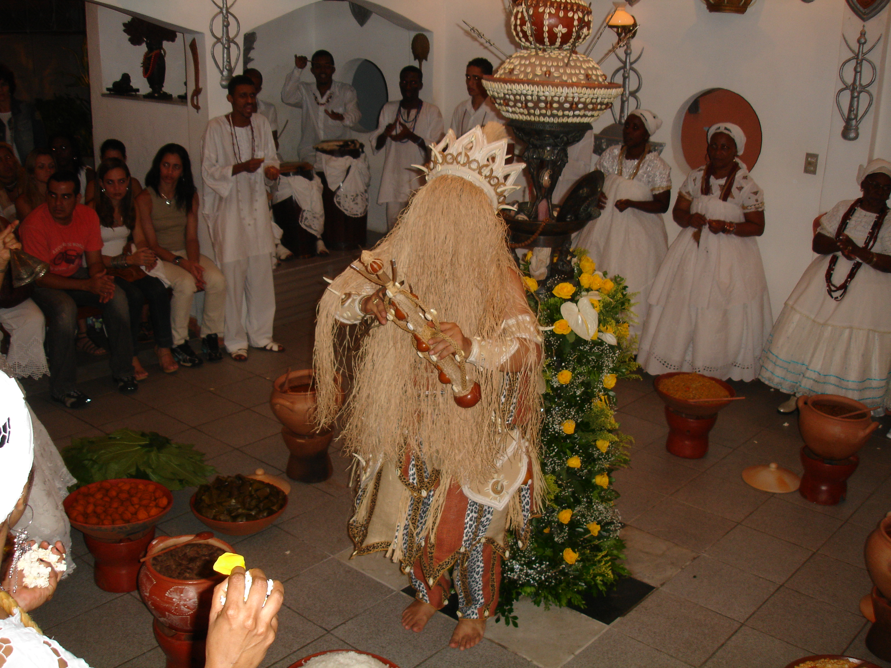 Obaluaye no Olubaje Orossi